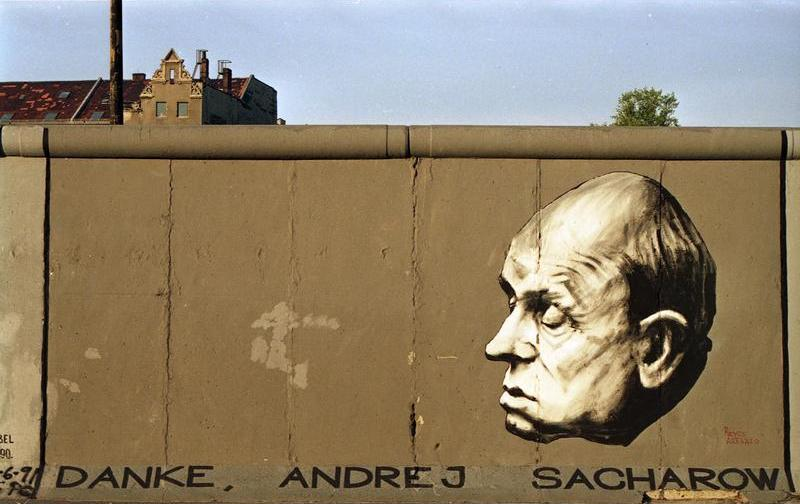 25.7.1991 "East-Side-Gallery", gelegen zwischen der Jannowitzbrücke und der Oberbaumbrücke. Reste der Berliner Mauer, die nach der Öffnung von vorwiegend ostdeutschen Künstlern auf der Ost-Seite bemalt wurden.